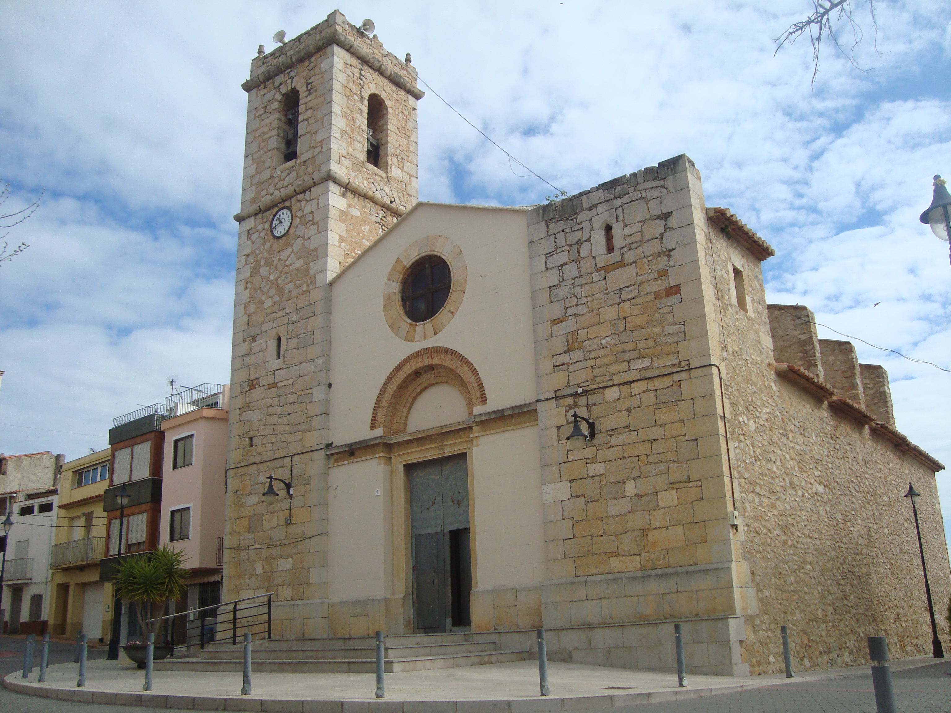 Església parroquial de Santa Quitèria (la Torre d'en Doménec) 05.120-001.